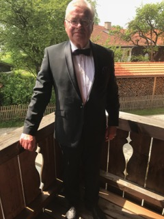 Prof. Dr. Raban Graf Westphalen